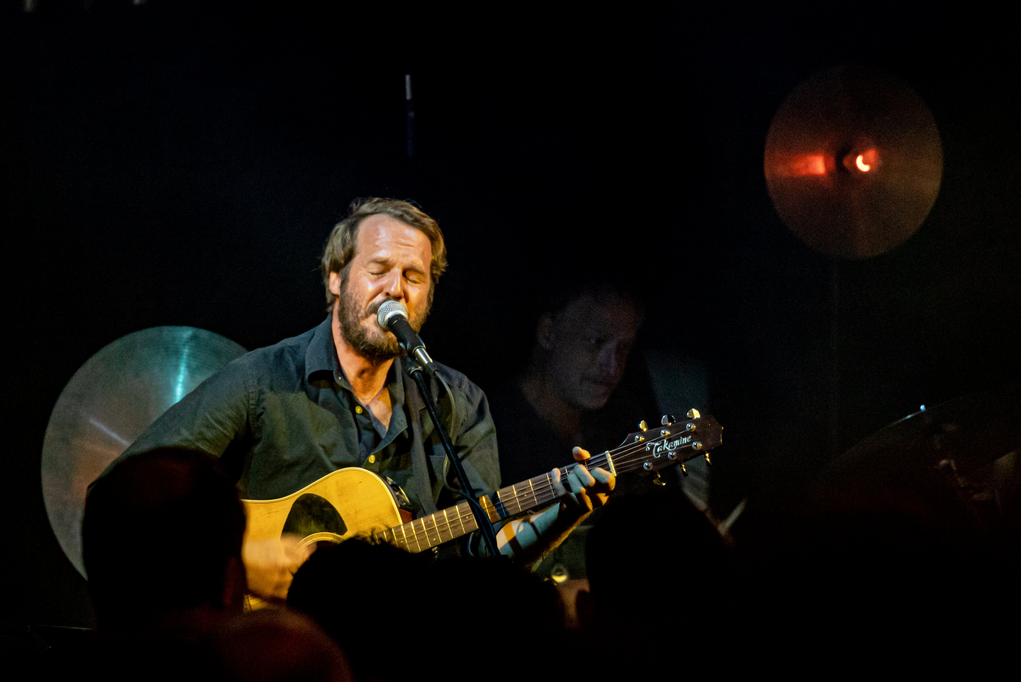 Bilder vom Zelt Musik Festival 2019 in Freiburg im Breisgau Gisbert zu Knyphausen am 04. 08. 2019